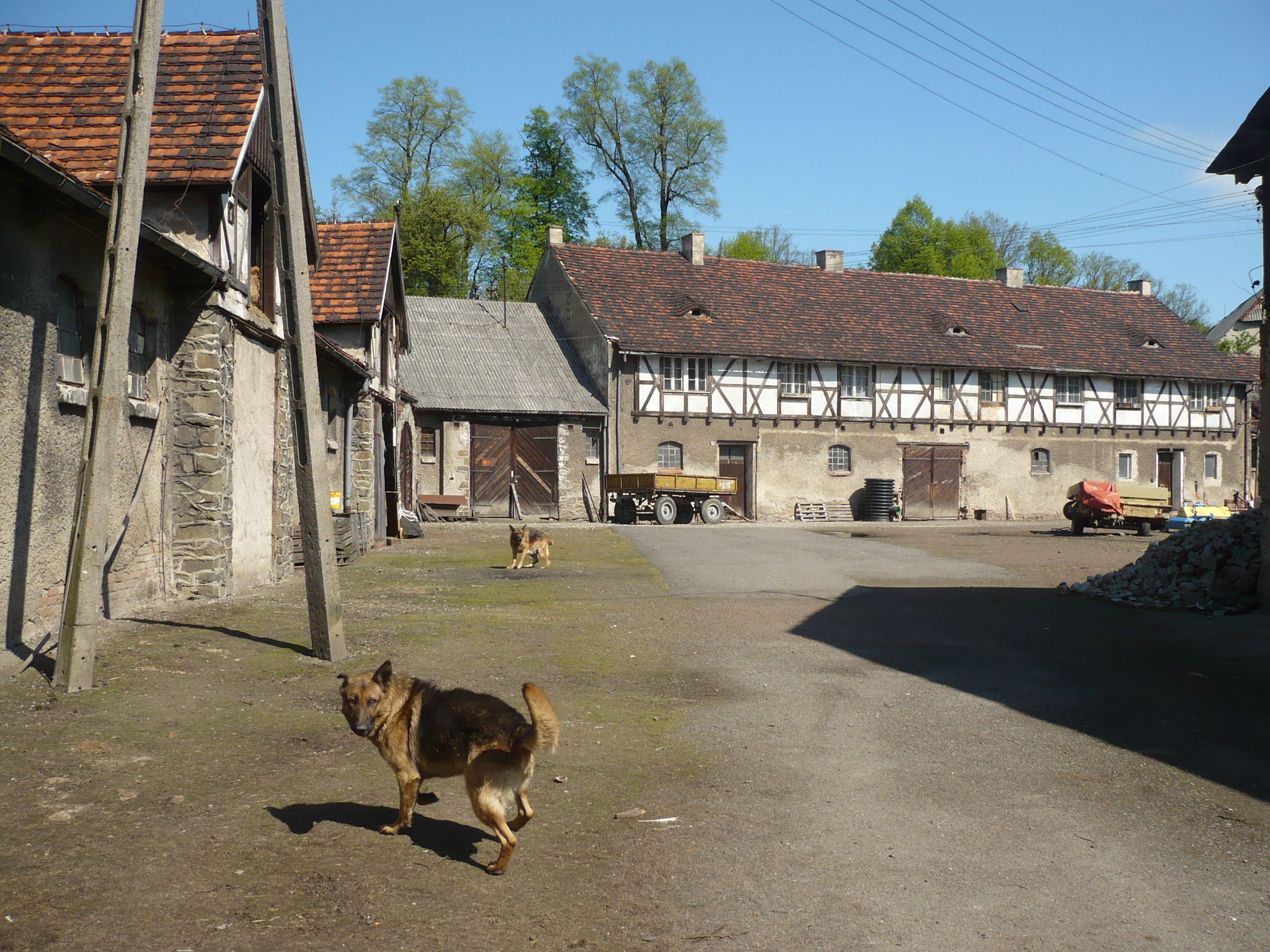 Lubiechów